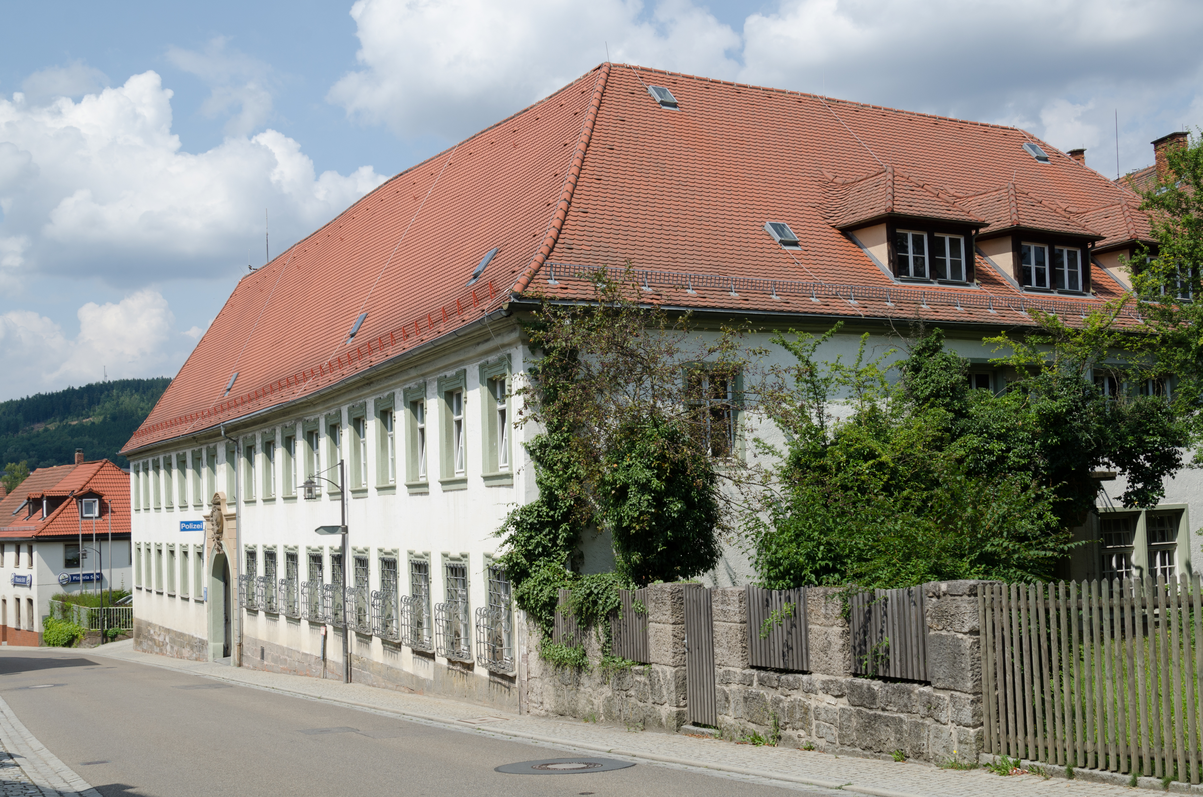 Stadtsteinach, Hauptstraße 7